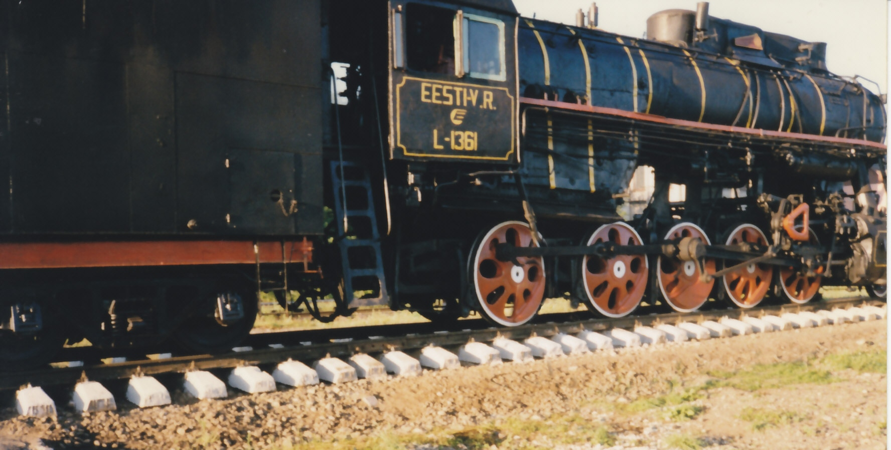 Памятник на вокзале Тапа - паровоз Л. 1996 г.